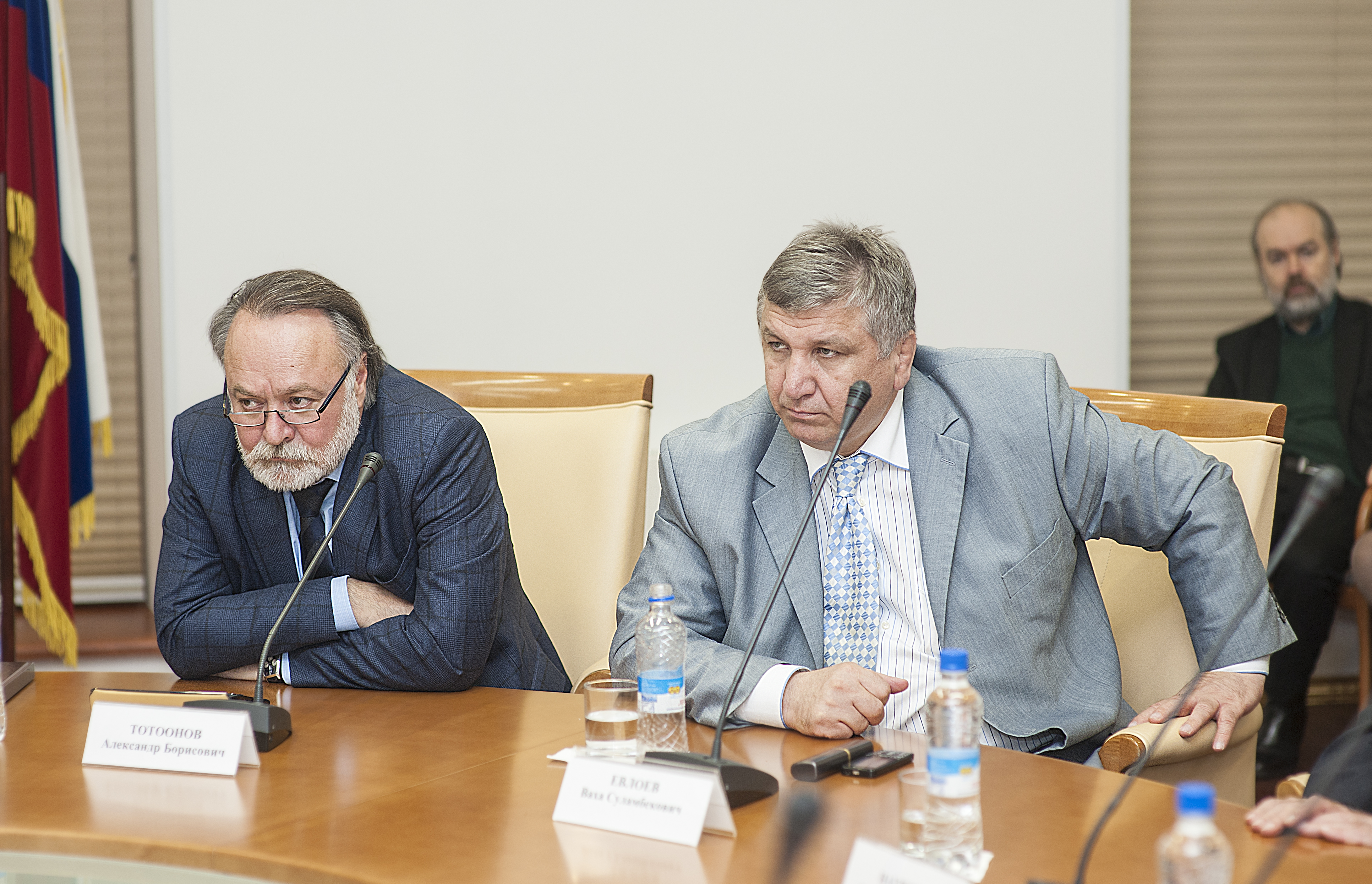 Александр Тотоонов и Ваха Евлоев на круглом столе «Сословия и нации Государства Российского в период династии Романовых», в Московском доме национальностей. 14 ноября 2013 года.